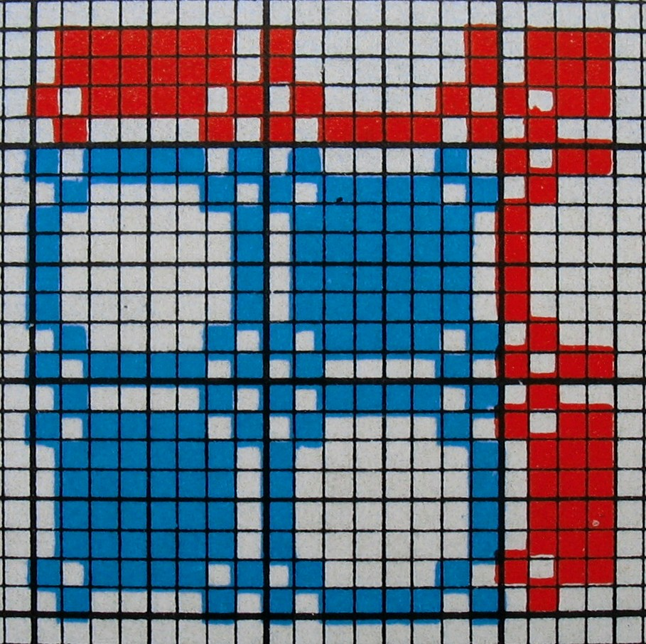 Bindungspatrone: Waffelbindung